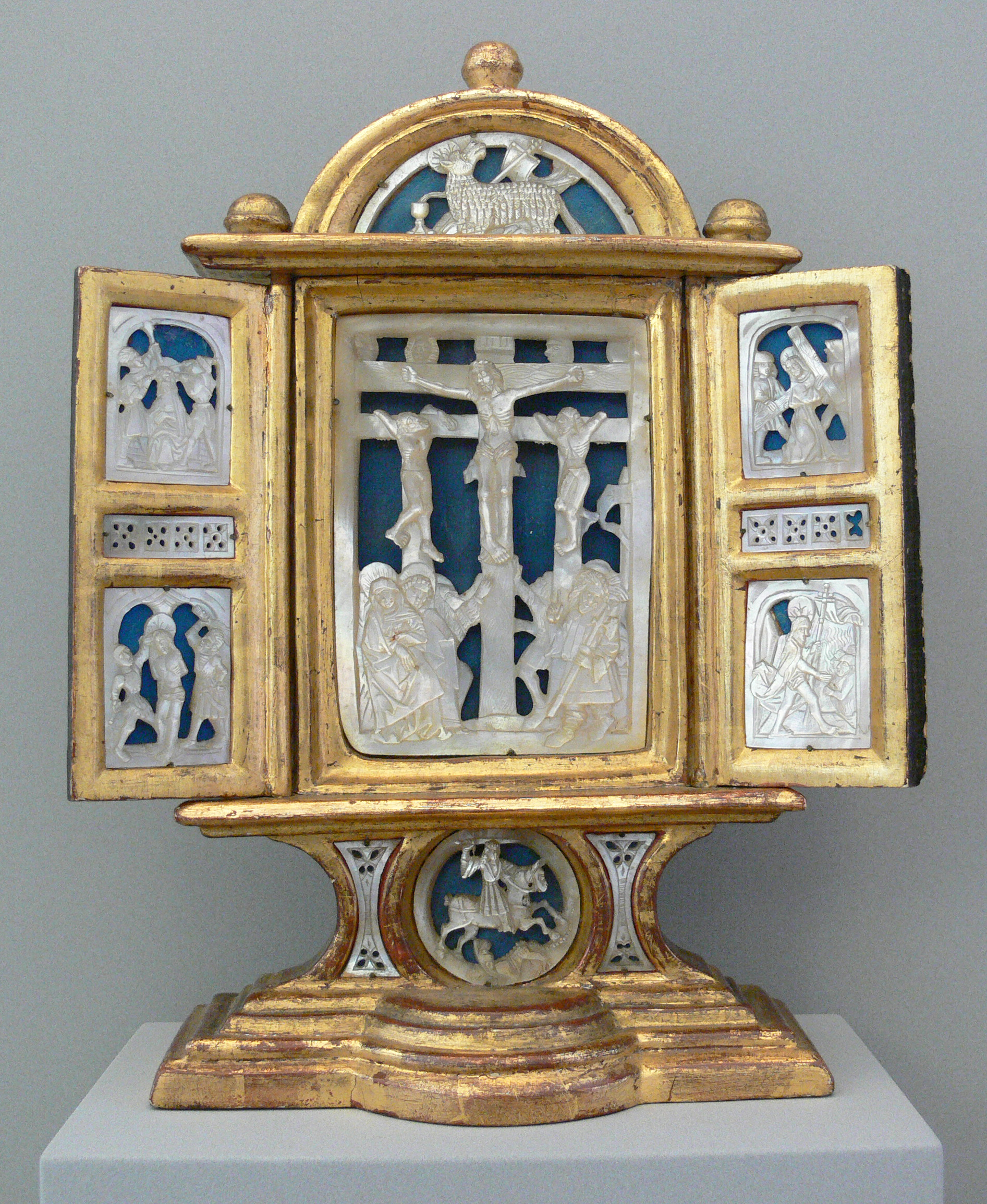 Flügelretabel mit Darstellungen aus der Leidensgeschichte Christi, Augsburg (?) um 1520, Perlmutter-Reliefs auf Holzträger Winged Altarpiece with Scenes from the Passion of Ccrist, Augsburg (?), c. 1520, nacre (mother of pearl) reliefs on wood Bode-Museum Berlin (Skulpturensammlung Inv. 1522), erworben 1856 für die Kunstkammer